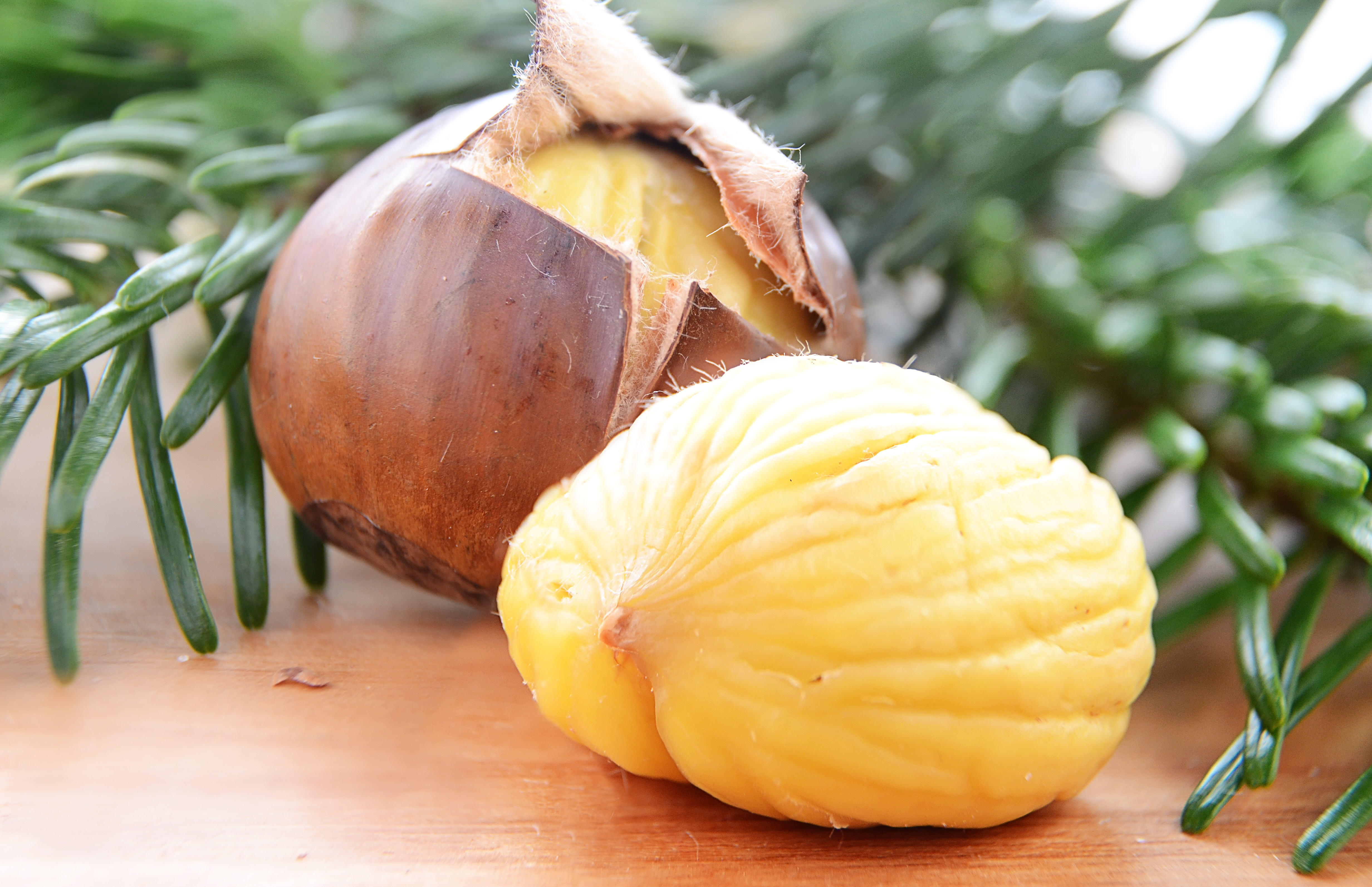 sweet chestnut